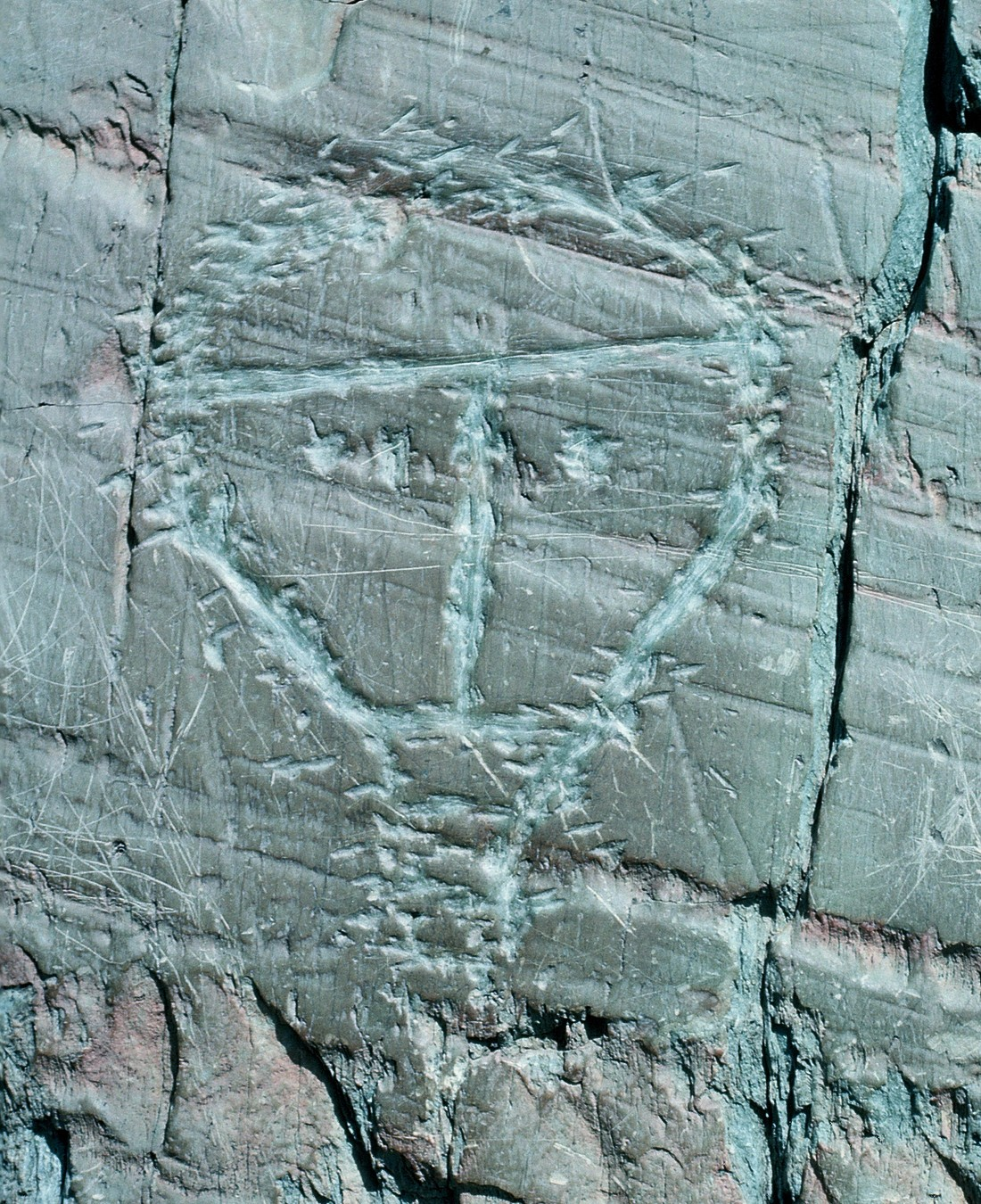 La Vallée des Merveilles, France. Le Christ